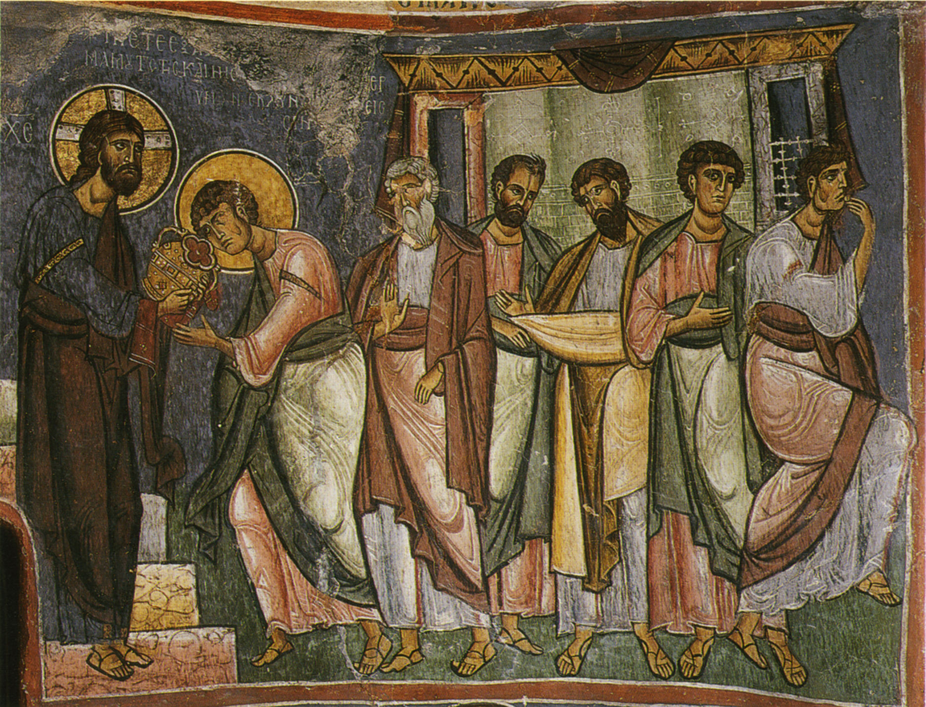 Apostelkommunion aus der Kirche Asinou in Zypern (Fresko)